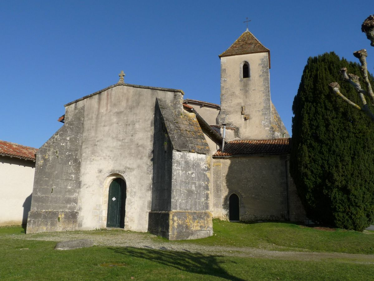 Eglise de St-Hilaire-de-Barbezieux, Charente, France